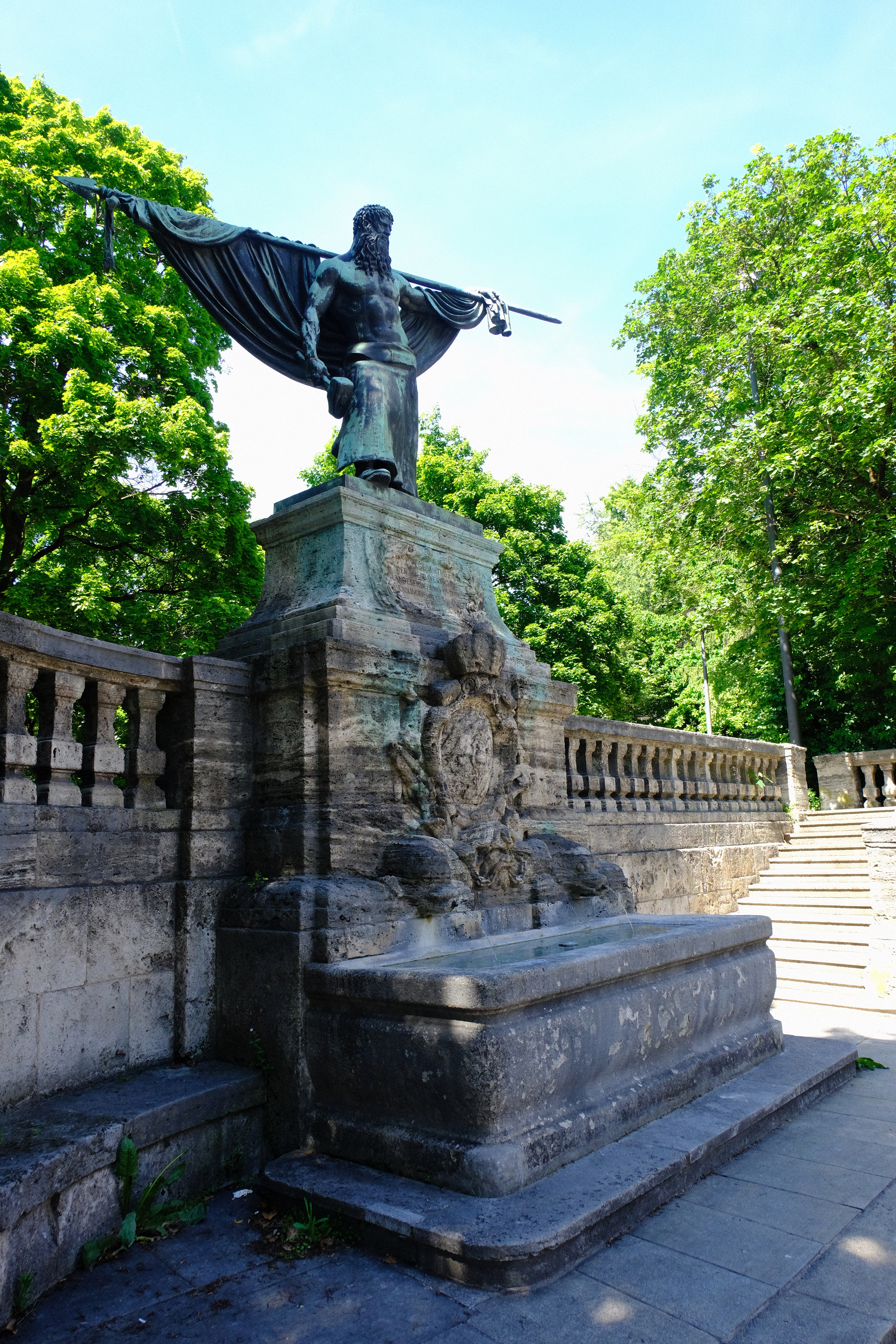 Der Schmied-von-Kochel-Brunnen in München Sendling (2019)